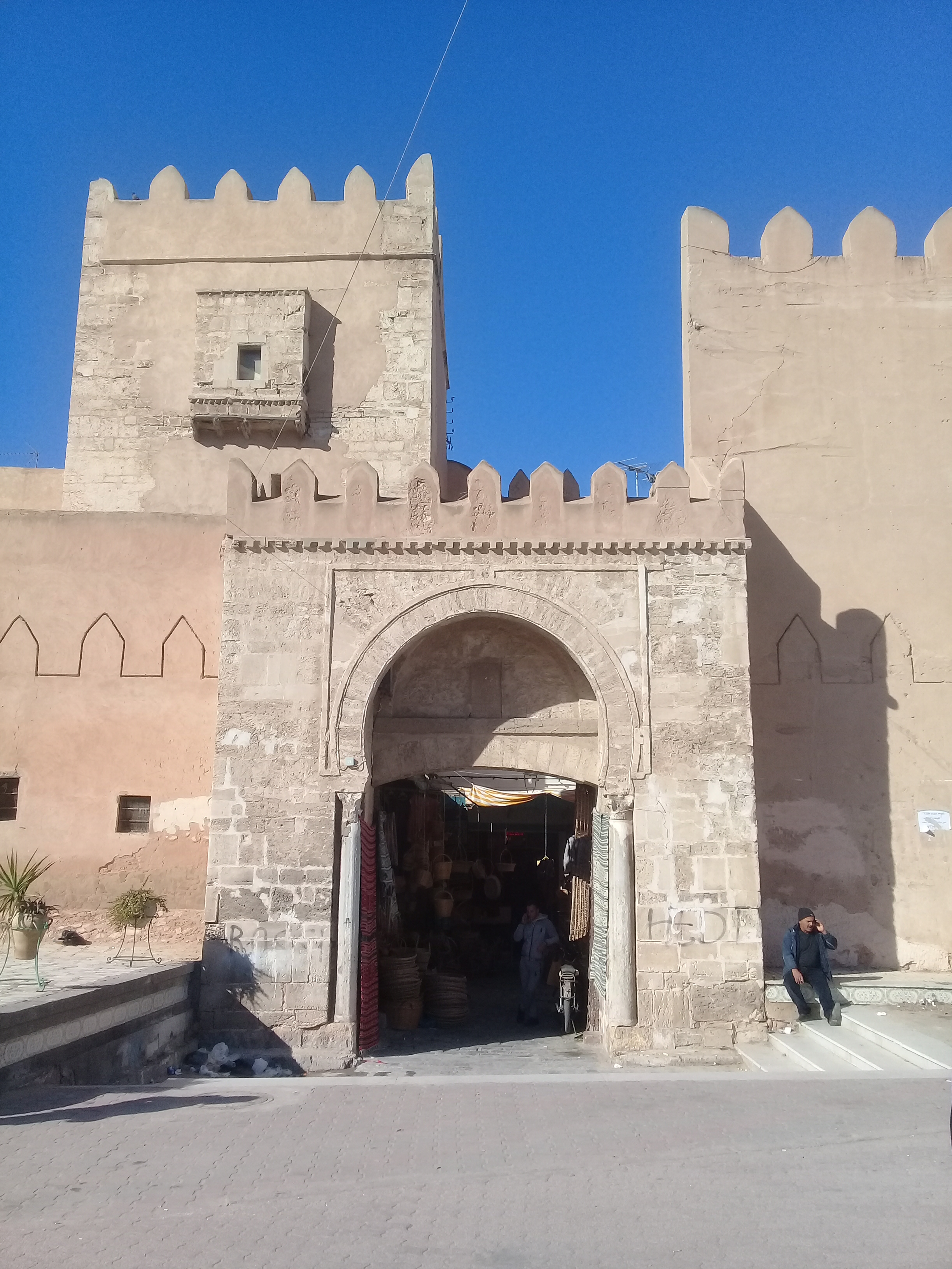 Bab Diwen - Vue de face